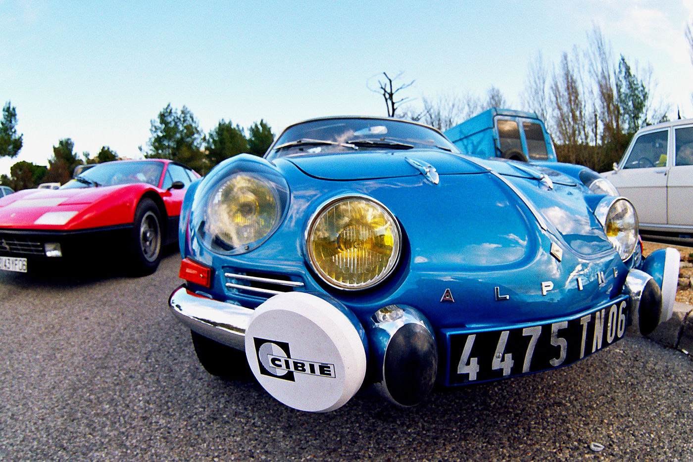 Alpine 1600S in stock configuration.